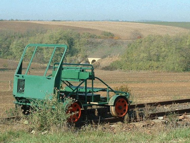 Rekonstruált pályamesteri könnyű vágánygépkocsi (Palotabozsok, a Pécs–Bátaszék-vasútvonal felhagyott szakasza)